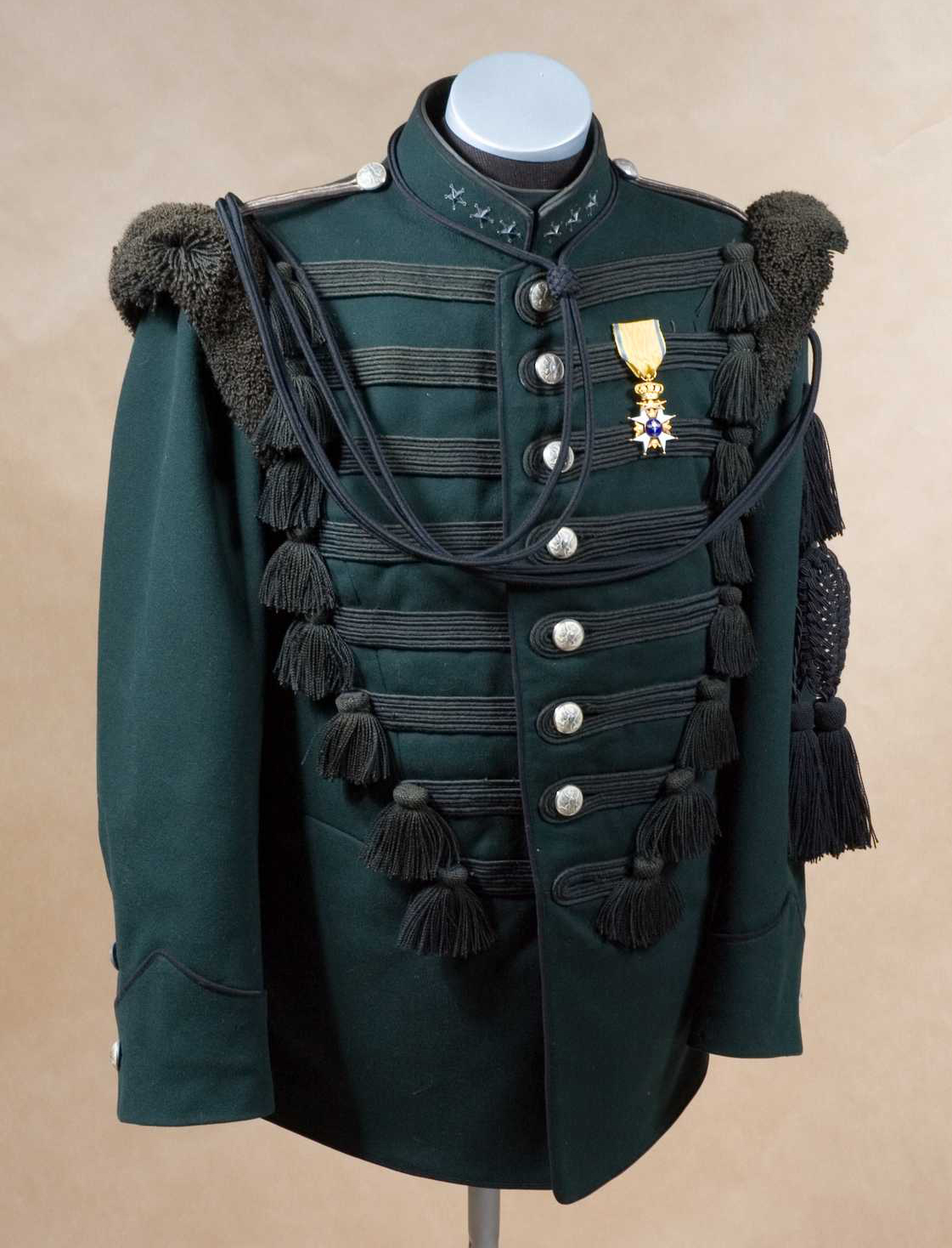 Jacka m/1859 för kapten vid Värmlands fältjägaregemente. Medaljen är Svärdsorden.